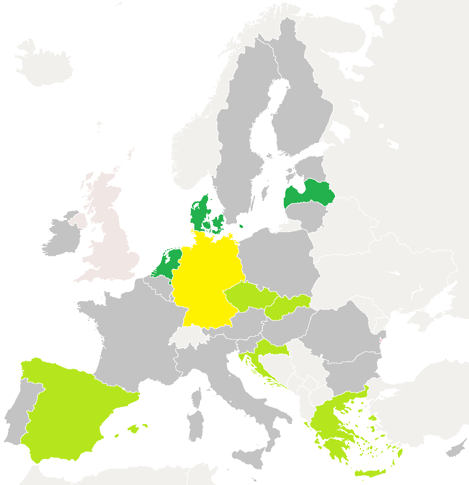 Podpredsedniška mesta v komisiji Ursule von der Leyen